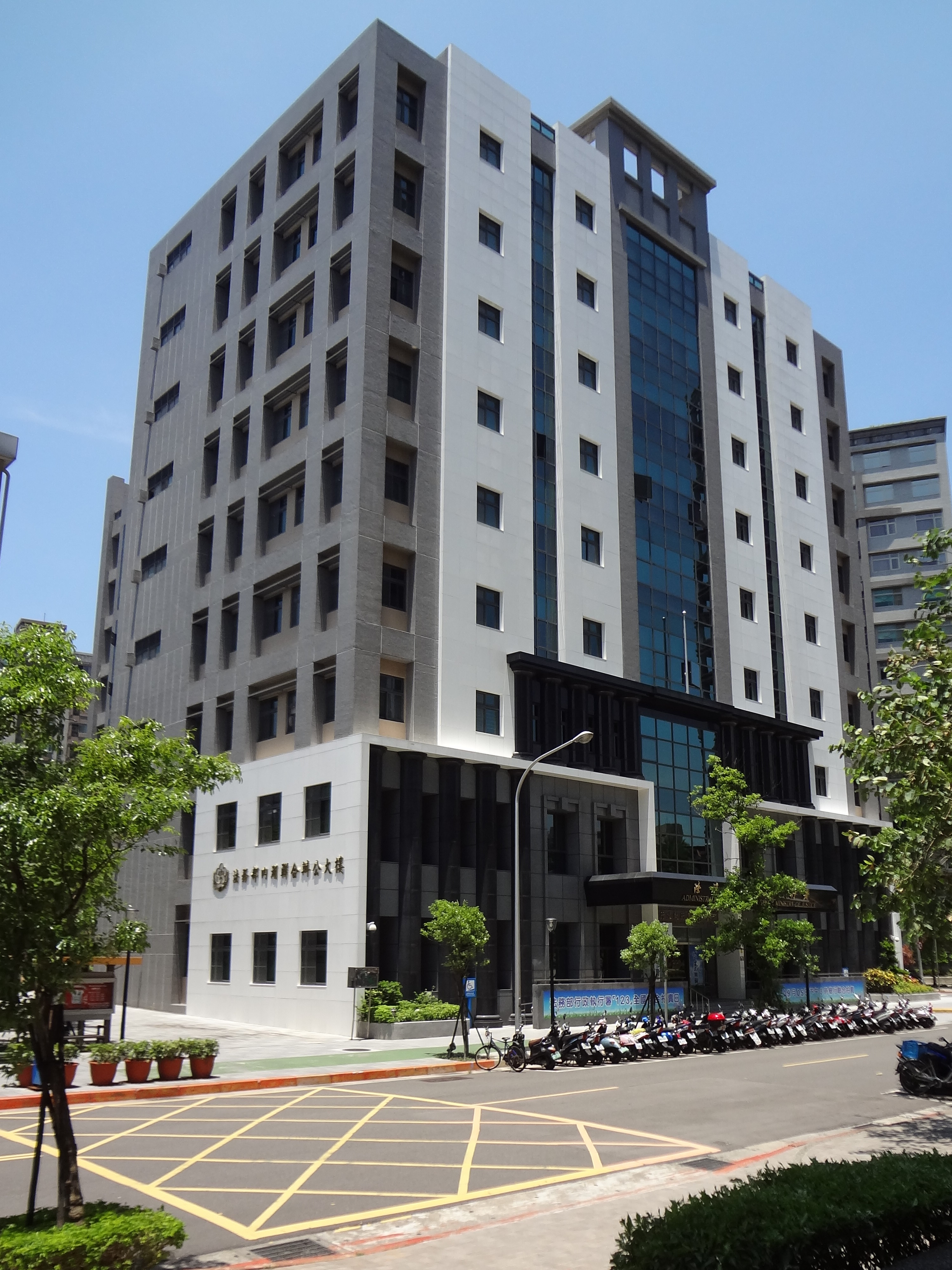 法務部內湖聯合辦公大樓，位於臺北市內湖區康寧路三段51號。